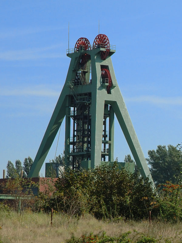 Germany Bergkamen Födergerüst "Haus Aden"